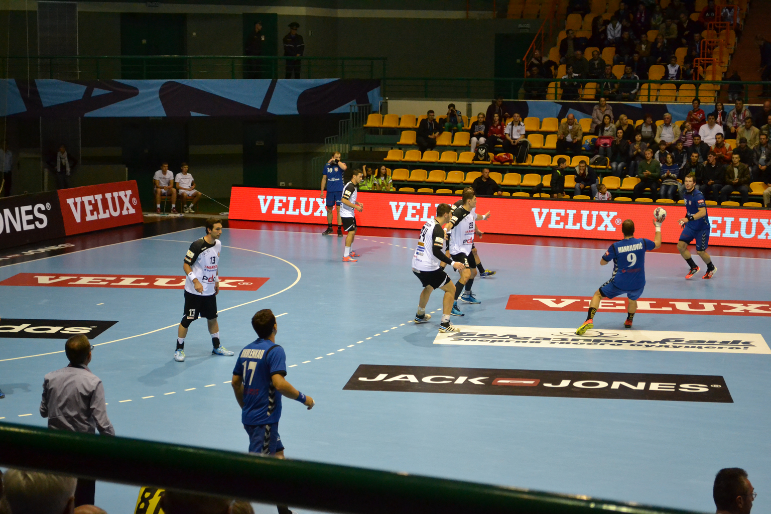 Беларуская (тарашкевіца): Матч Лігі чэмпіёнаў паміж берасьцейскім клюбам «БГК імя Мяшкова» і «Мэталюргам» са Скоп’е.